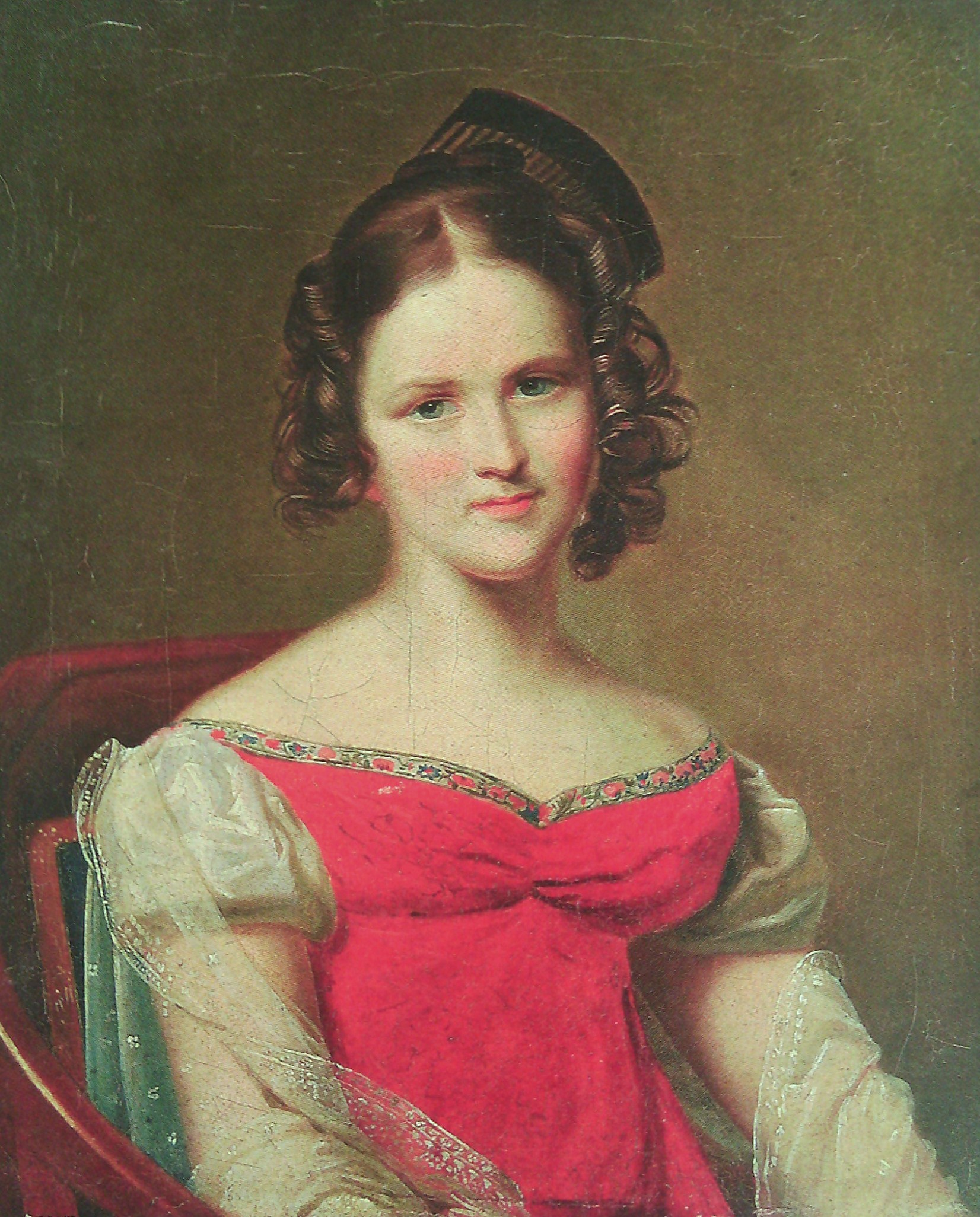 Княгиня София Степановна Щербатова, урождённая Апраксина (1798—1885)